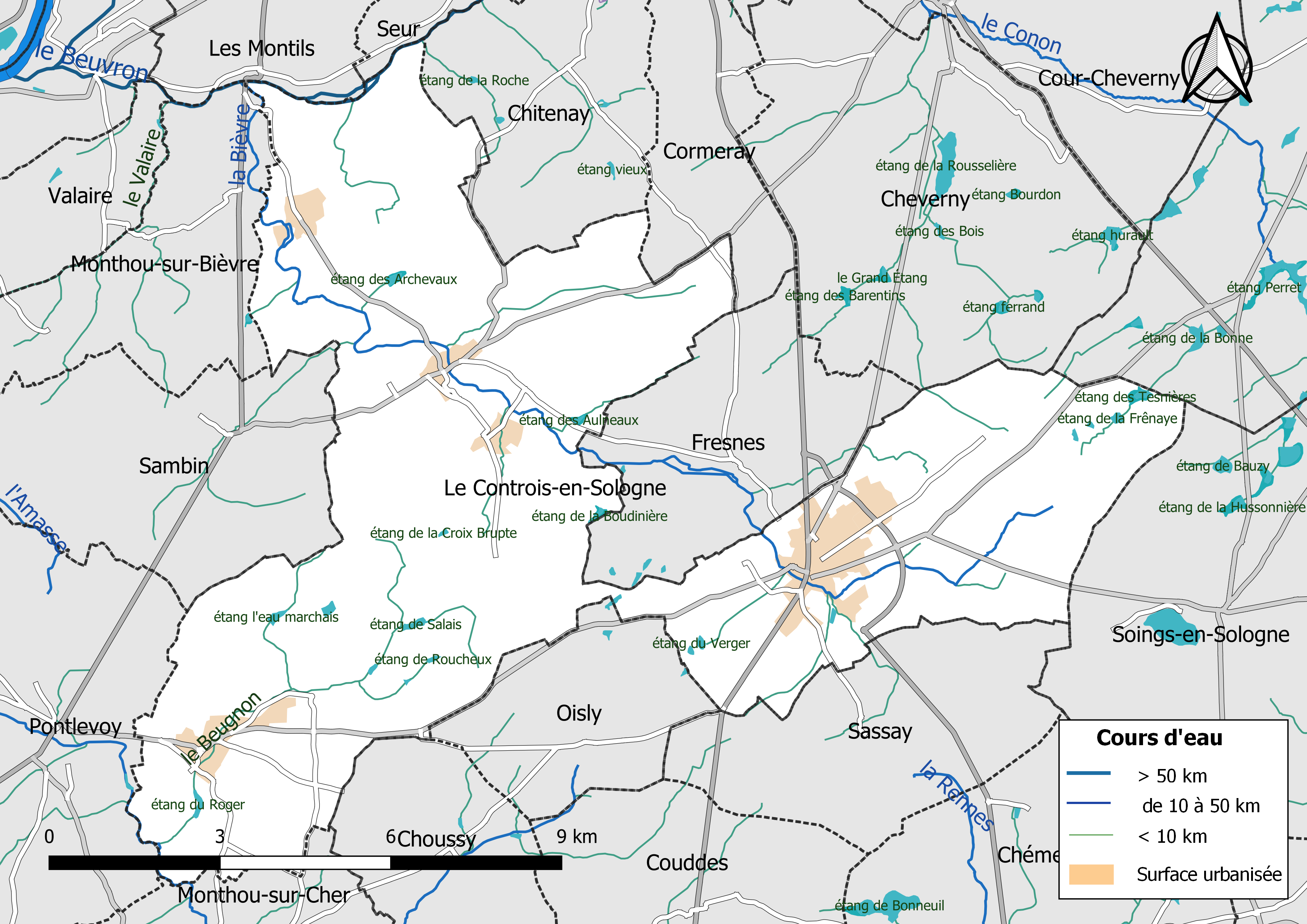 Carte du réseau hydrographique de la commune de Le Controis-en-Sologne (Loir-et-Cher, France).